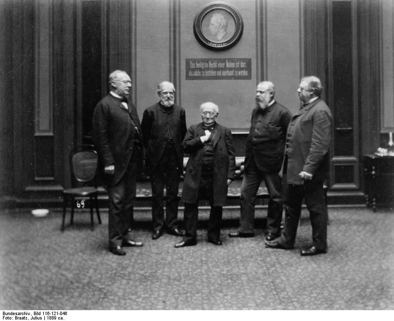 Mitglieder des Deutschen Reichstages v.l.n.r.: Freiherr von und zu Frankenstein, Graf v. Praschma, Dr. Windthorst, Graf v. Preysing (Landshut), Freiherr v. Wendt [Unter dem Medaillon P. Pfizer mit Inschrift "Das heiligste Recht einer Nation ist das, als solche zu bestehen und anerkannt zu werden." Aufnahme aus Fotoalbum der "Deutsche Reichstag und sein Heim"] Abgebildete Personen: Frankenstein, Georg A. von und zu Freiherr: Politiker, Deutschland Praschma, Hans Freiherr von Bilkau, Graf: MdR, Mitglied des Abgeordnetenhauses Preußen, Deutschland Windthorst, Ludwig Dr.: Justizminister des Königreichs Hannover, Reichstagsabgeordneter (MdR), Rechtsberater und Bevollmächtigter König Georgs V., Deutschland (GND 118633678)